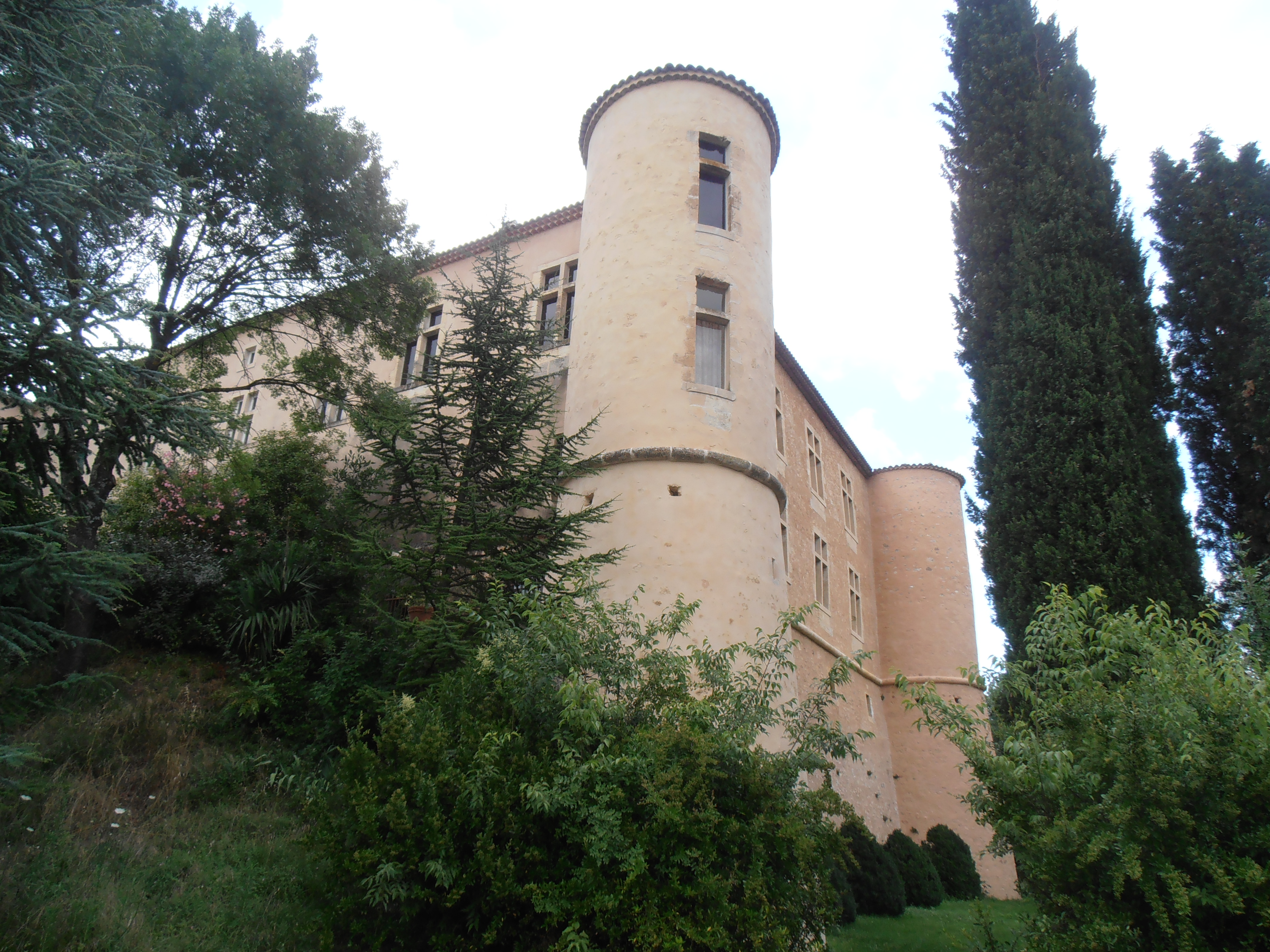 83, Vins-sur-Caramy, Les tours d'angles du château, particulièremnt imposantes, illustrent prfaitement l'importance et la complexité des travaux de conservation-restauration